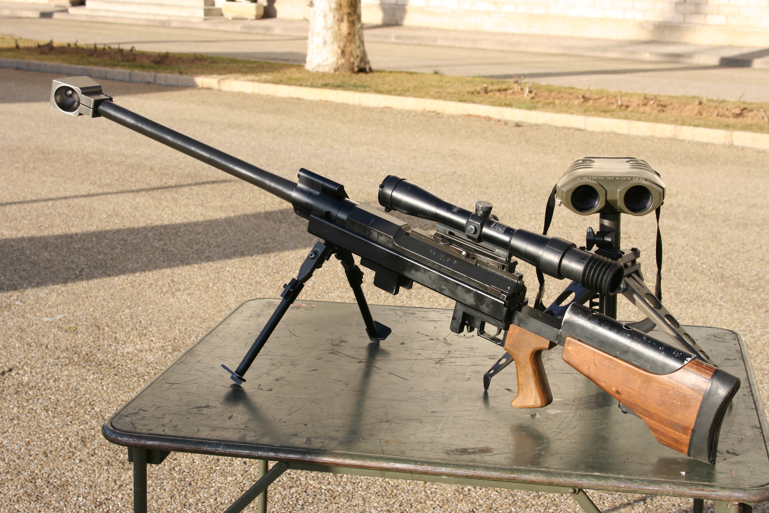 Fusil de tireur d'élite PGM Hécate équipé d'une lunette SCROME